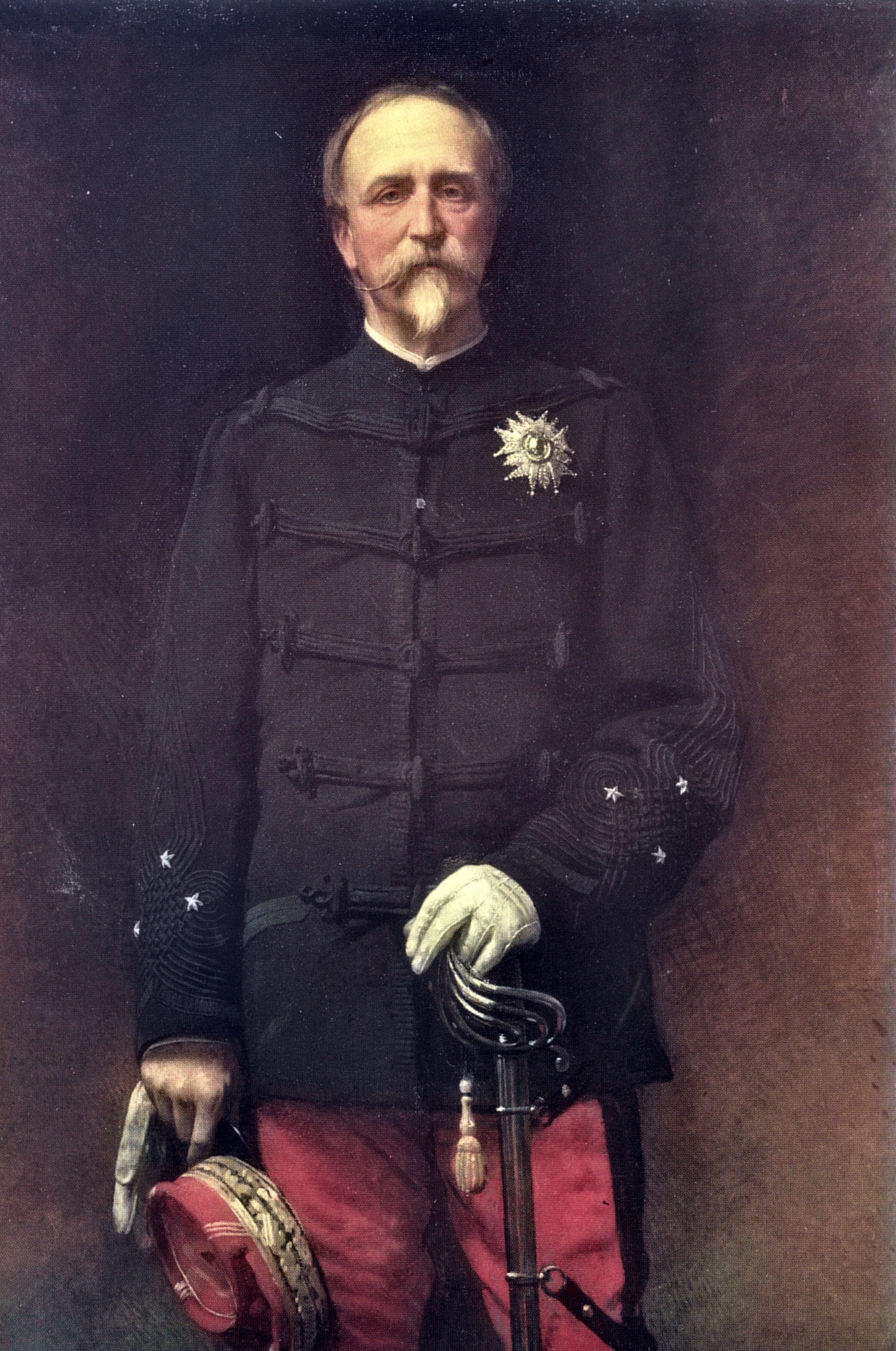 Porträt Henri-Eugène-Philippe-Emmanuels d’Orléans, Herzog von Aumale, in der Uniform der Ehrenlegion